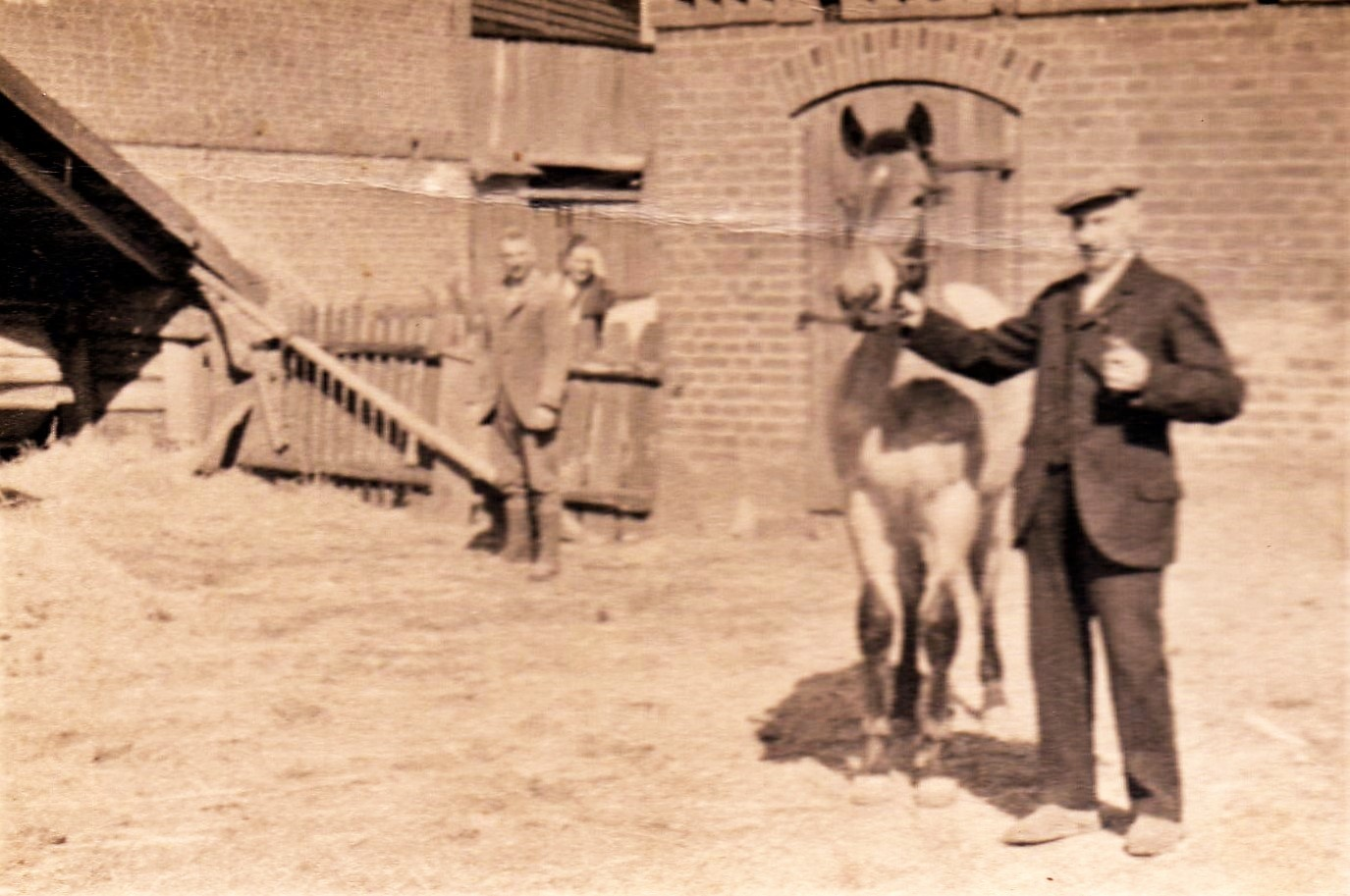 Kępa (Kappe), Landwirte und Pferdezüchter (1936)